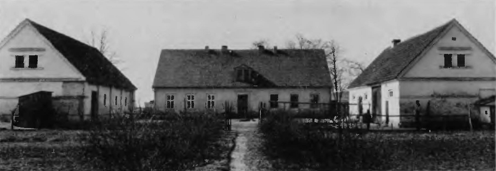 Ehemalige Oberförsterei in Brzezetz im Landkreis Cosel in Oberschlesien. Erbaut um 1840.